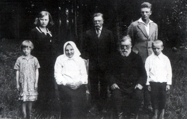 Сваякі беларускага пісьменнька Максіма Танка. Дзед Хвёдар (сядзіць у цэнтры) і баба Улляна з нашчадкамі: у другім шэрагу стаяць сястра Максіма Танка Вера, бацька Іван, сам паэт. Побач з дзядамі — сястра Мілка і брат Федзя. 1930-я гады.